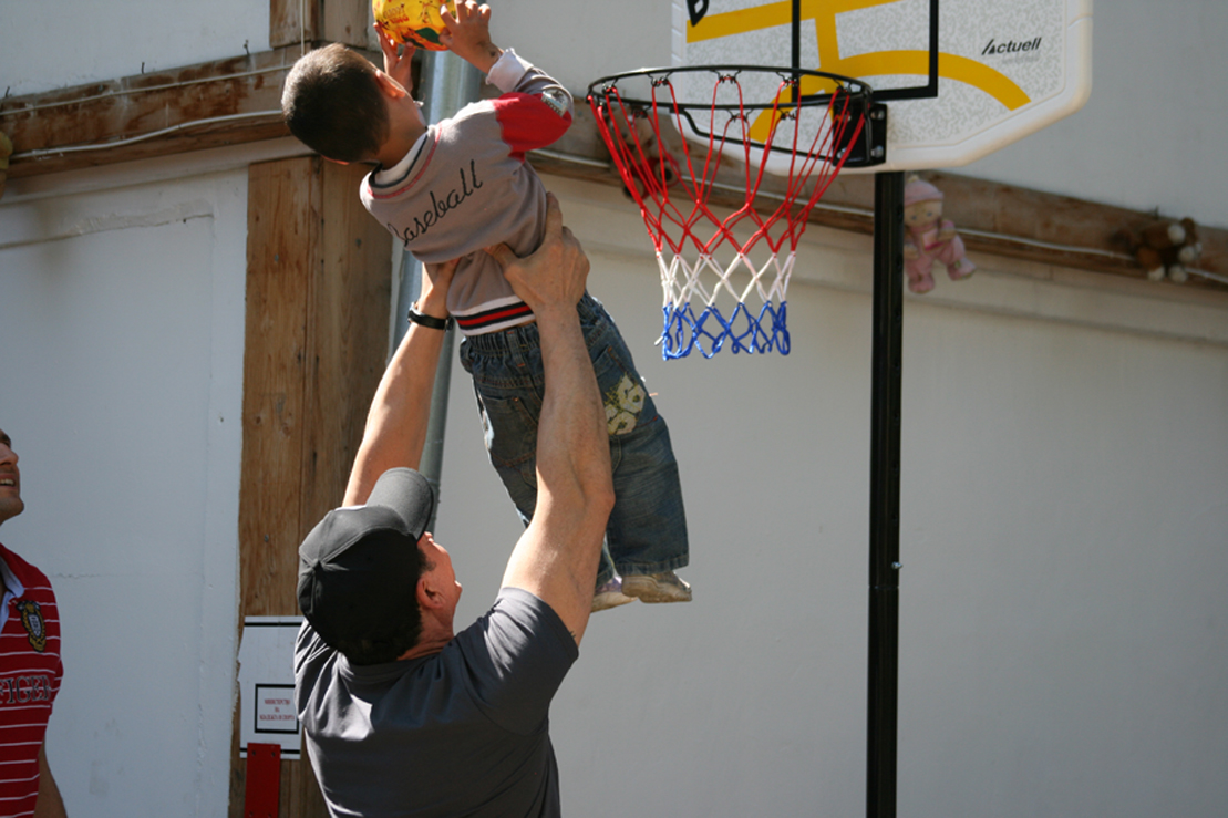 Димитър Куцаров в приюта в Нови хан